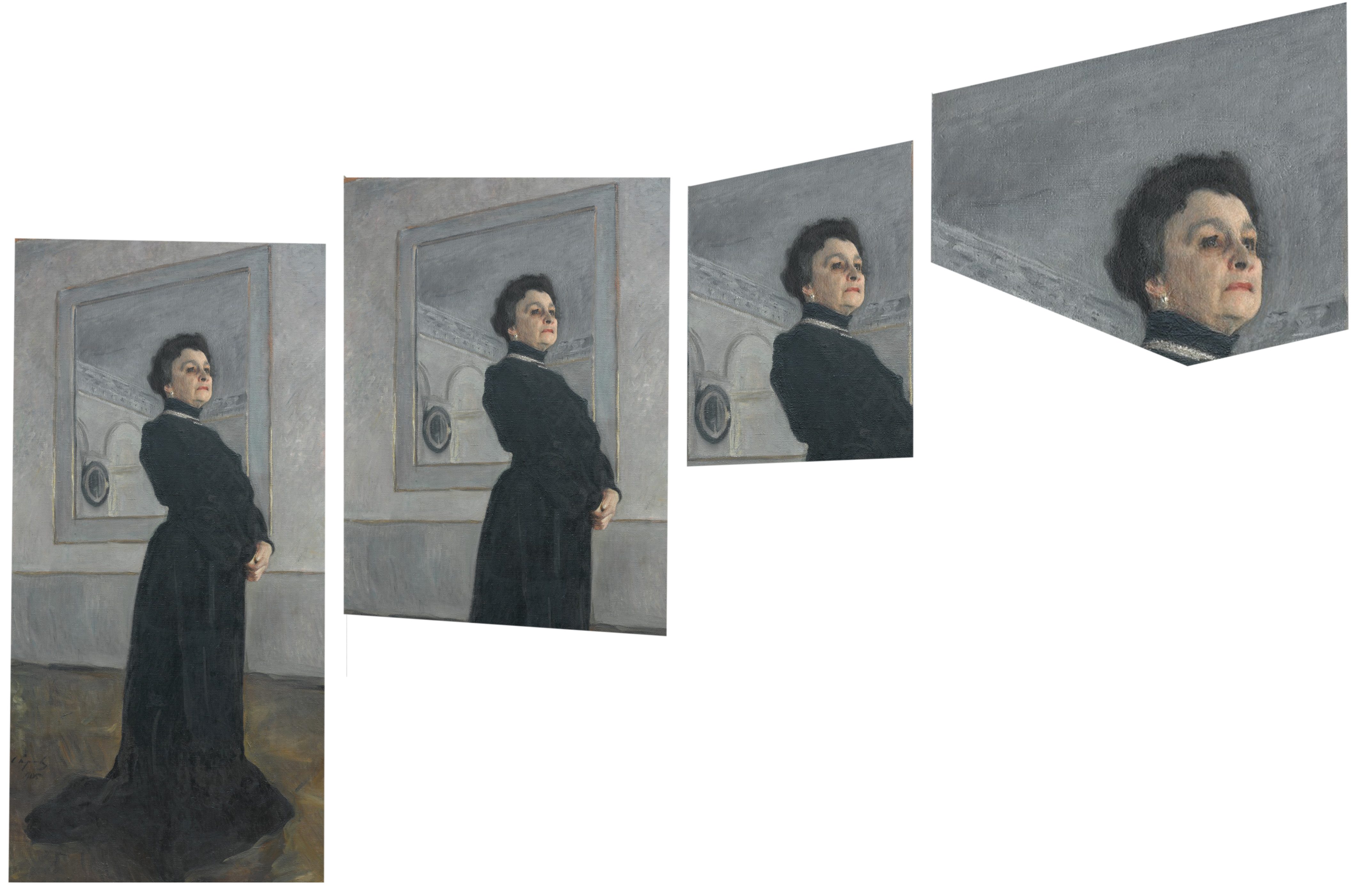 Портрет Ермоловой М. Н. раскадровка по Эйзенштейну С. М.